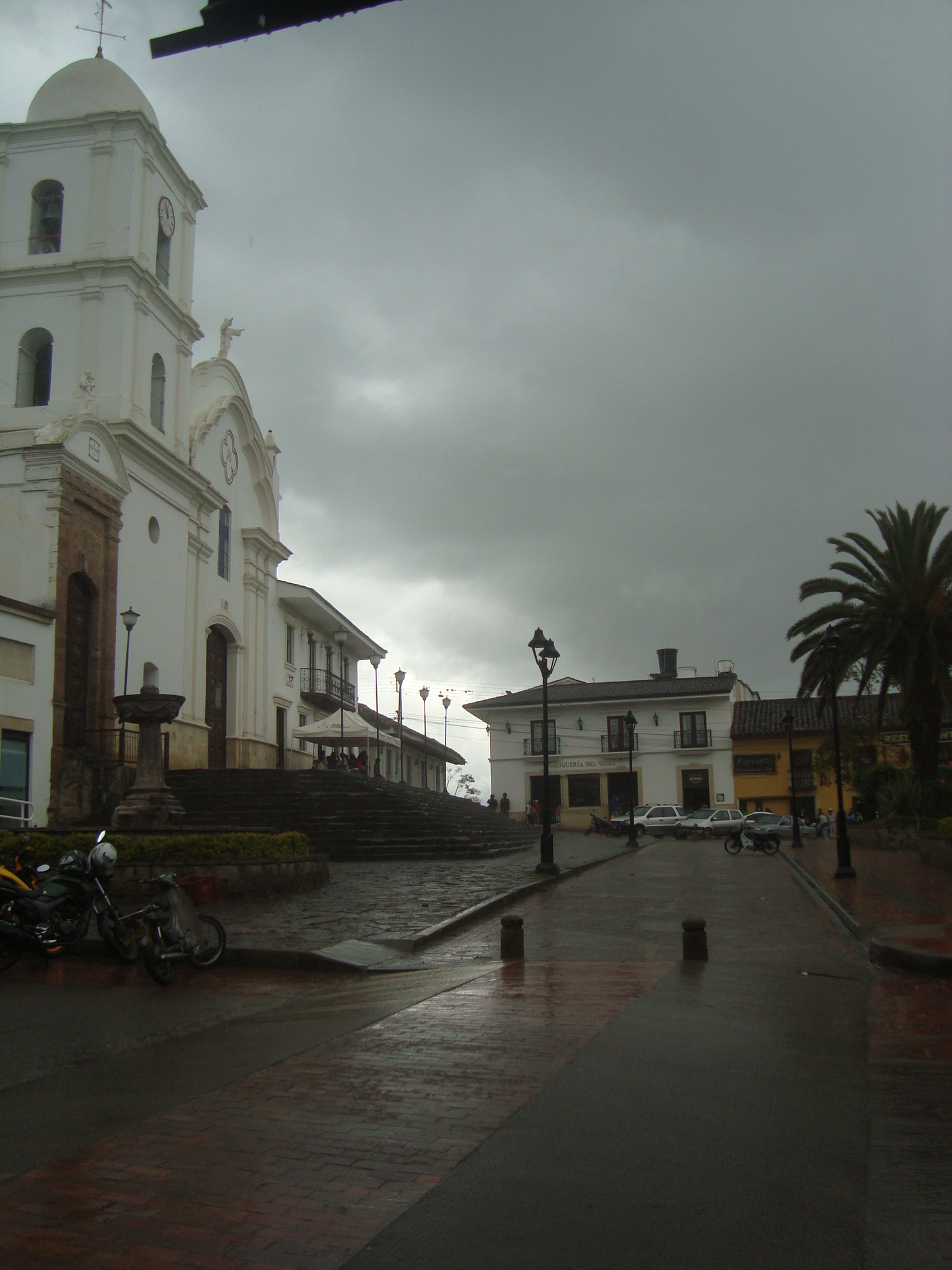 Templo y Parque de Guateque, durante la lluvia.